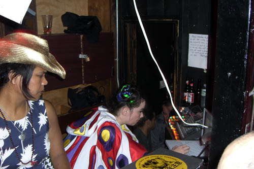 Björk DJing off of her iBookBjork